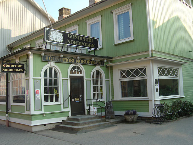 Foto på Conditori Nordpolen, tagen av mig själv.